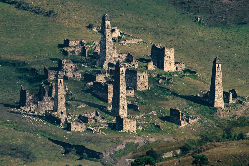 Башенный комплекс в древнем ингушском городе Таргим (Джейрахский район, Ингушетия)